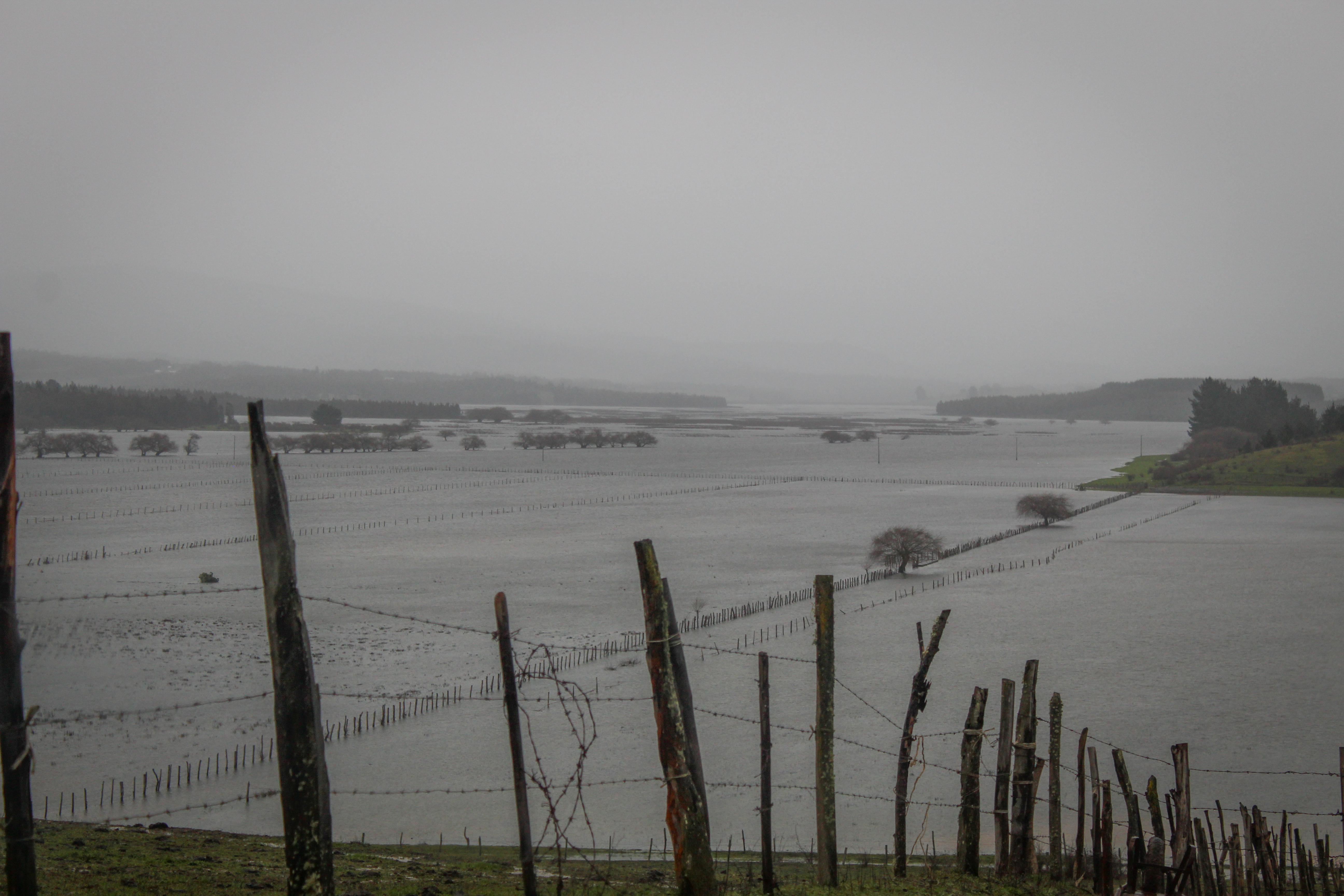 Lago que se forma cada invierno. Antiguamente fue el refugio de cientos de familias Mapuche ante los ataques del ejército español